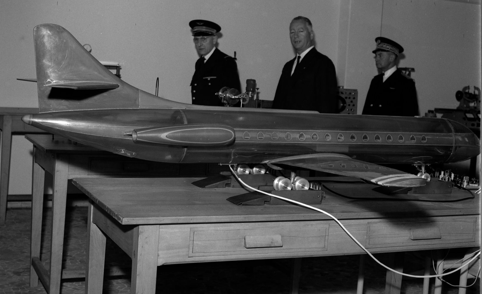 L'ENICA à Toulouse. Le 21 Octobre 1963. Vue de Pierre Messmer, ministre des Armées, qui inaugure l'ENICA de Toulouse.